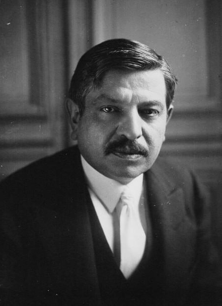 Pierre Laval, ministre de l'Intérieur. Photographie de presse de l'agence Meurisse, 1931.